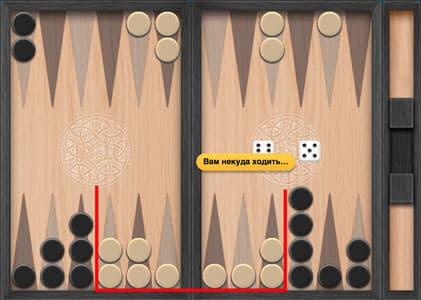 Блок в нардах